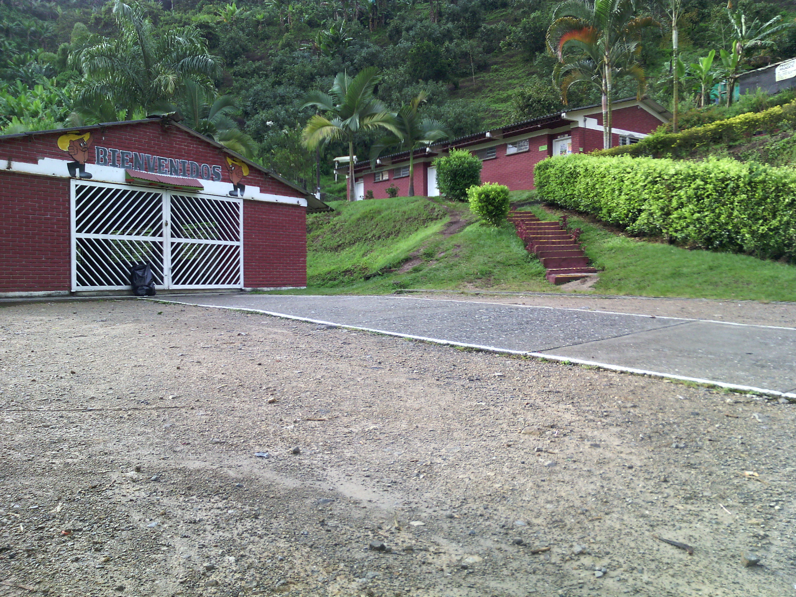 Institución Educativa Santiago Gutiérrez Ángel. Argelia, Valle del Cauca, Colombia.